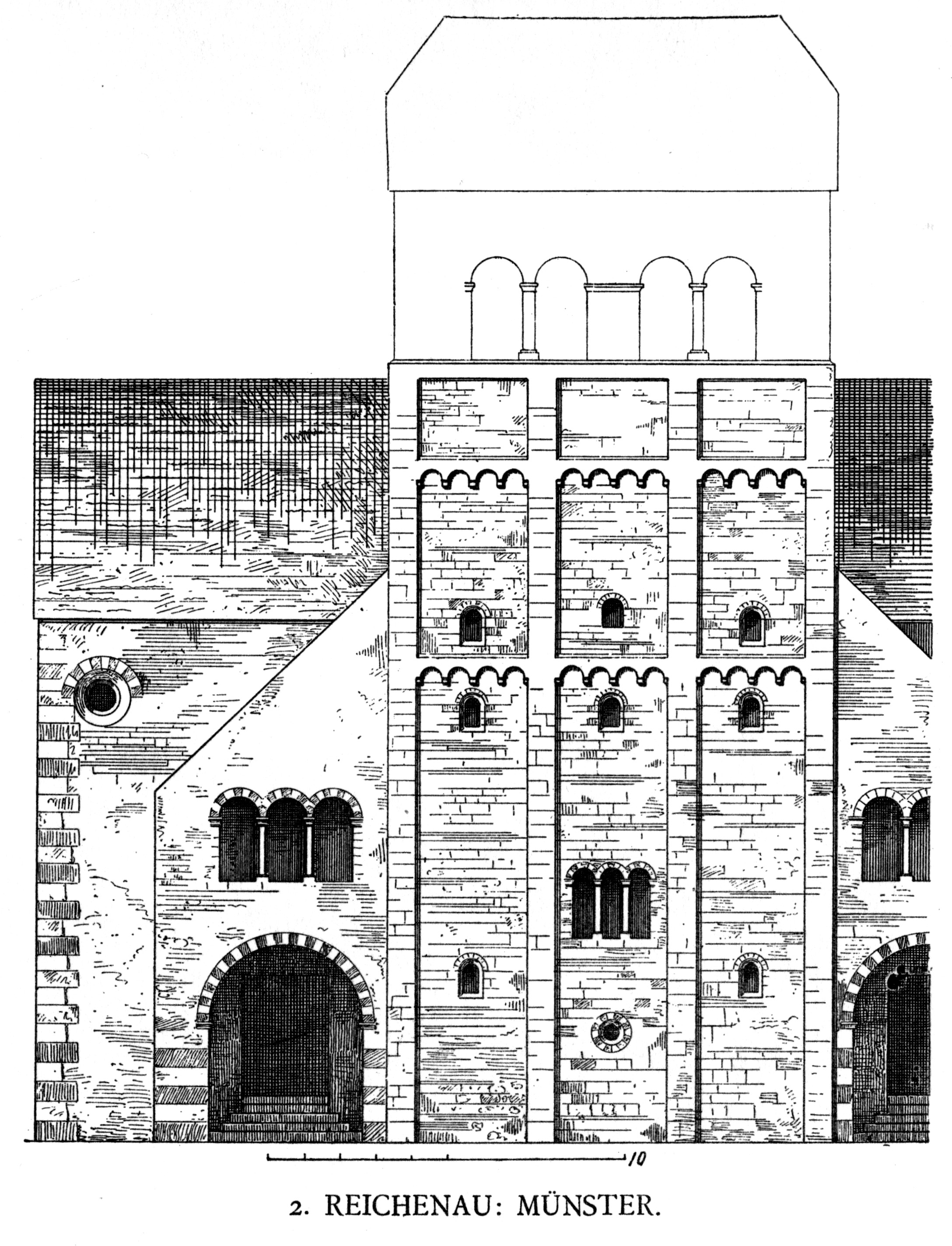 Reichenau, Münster.